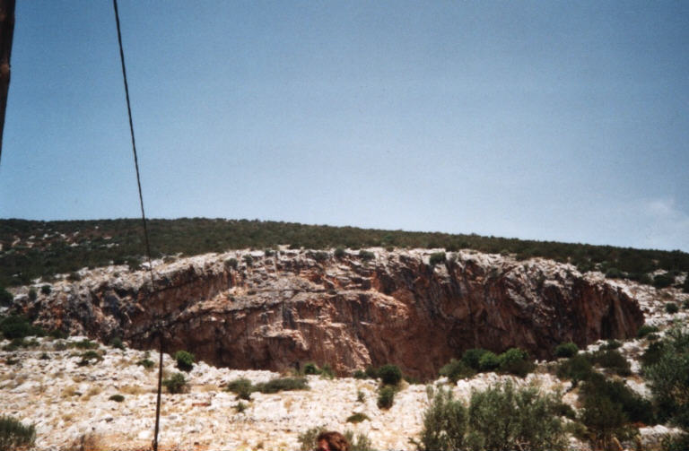 (Einsturz-)Dolinen von Didyma (Griechenland)